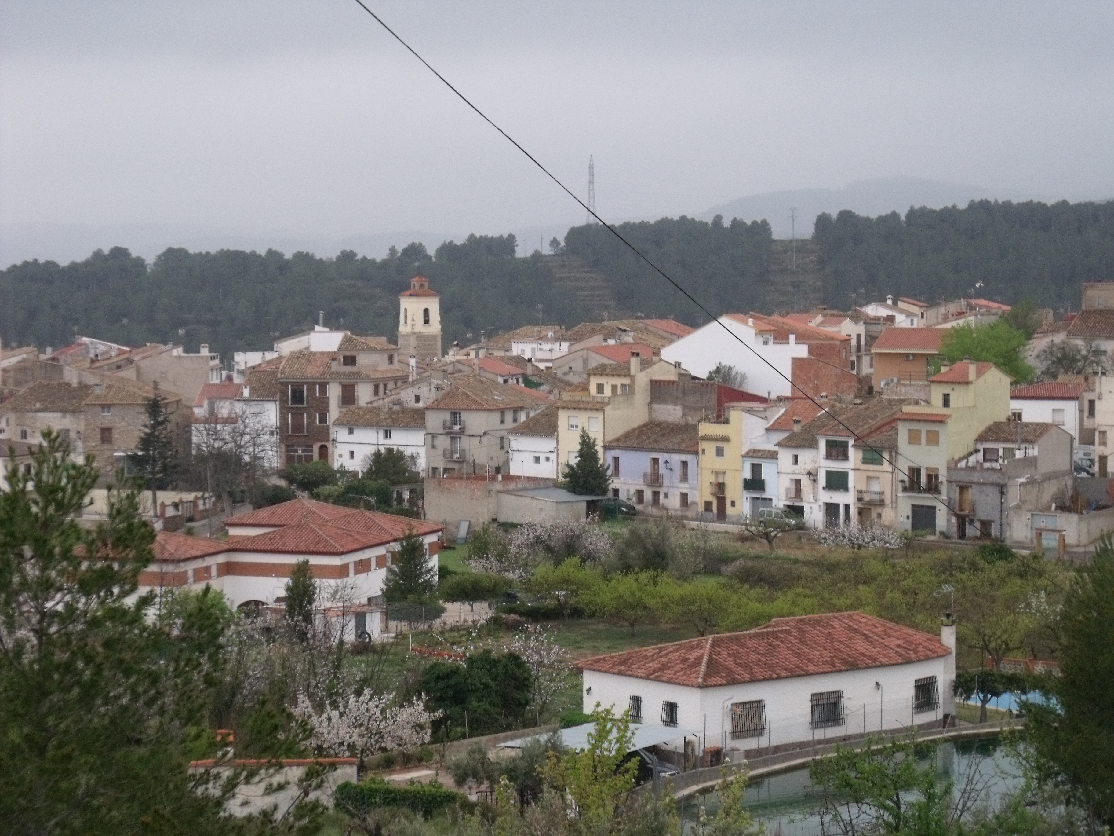 vista general del pueblo